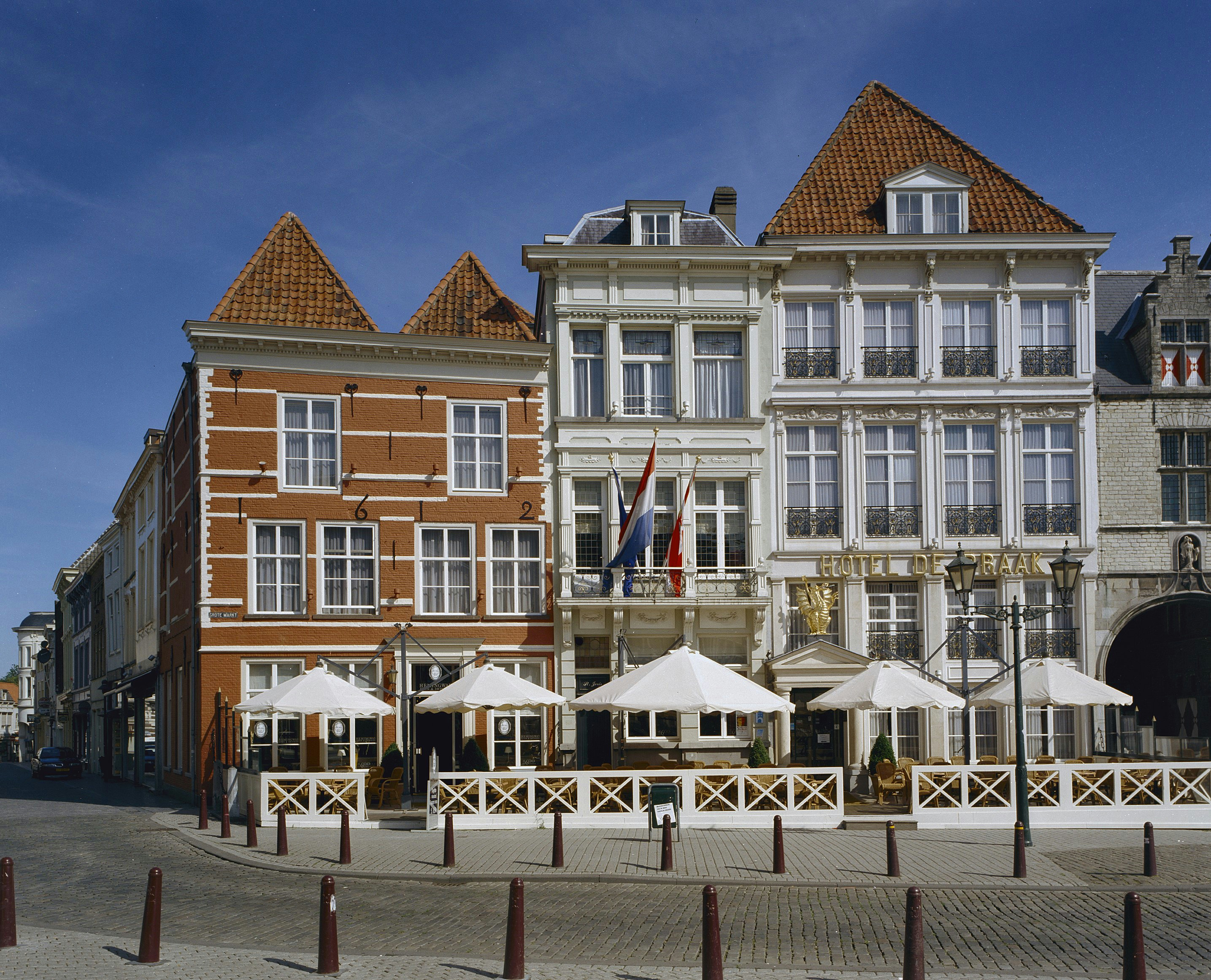 Hotel De Gouden Draak: Exterieur overzicht voorgevels